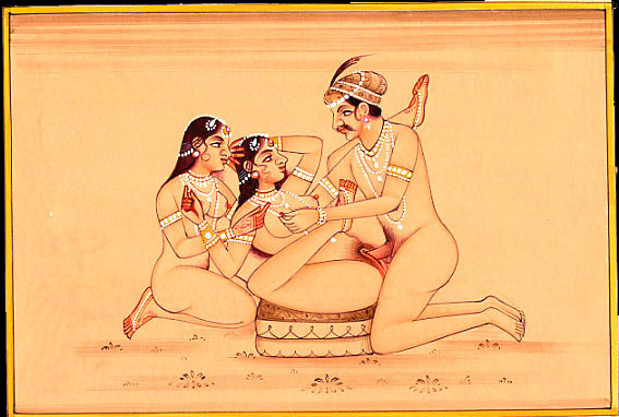 Kama Sutra Illustration